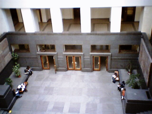 Faculty of Law in Prague - Právnická fakulta v Praze. architekt: Jan Kotěra